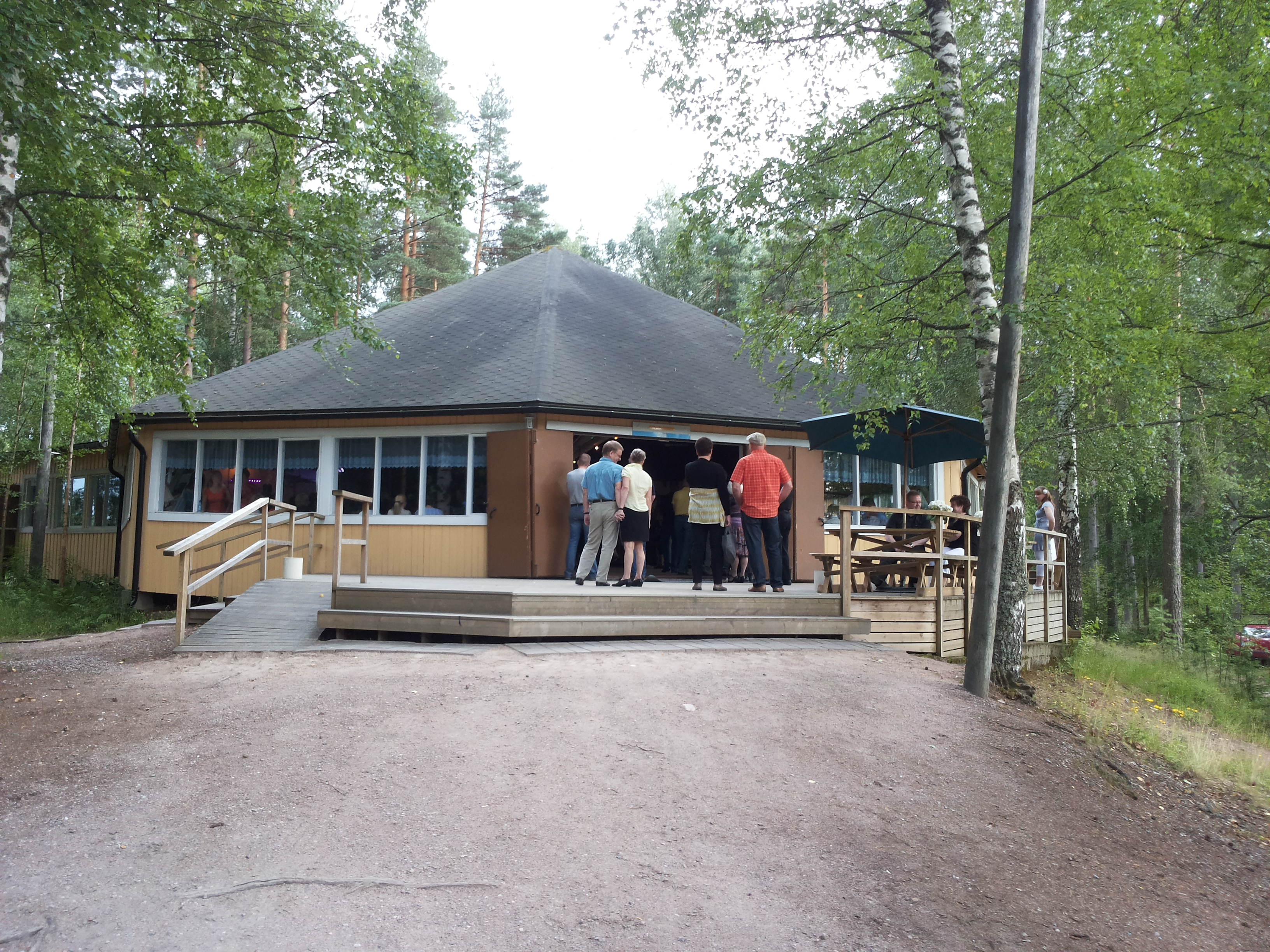 Kolmilammi tanssilava Ryttylä, Hausjärvi